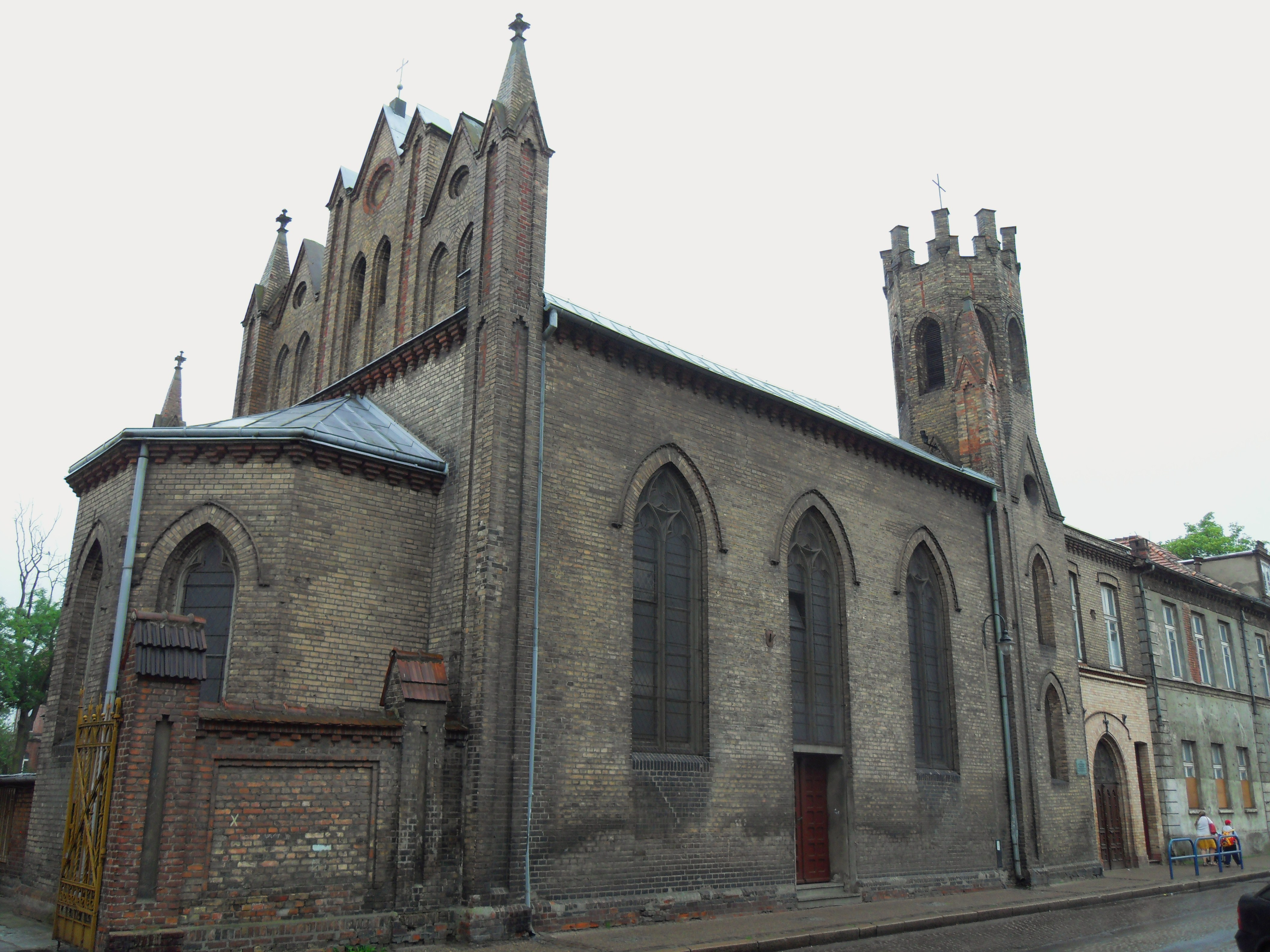 Gdańsk Dolne Miasto, kościół Niepokalanego Poczęcia Najświętszej Maryi Panny.